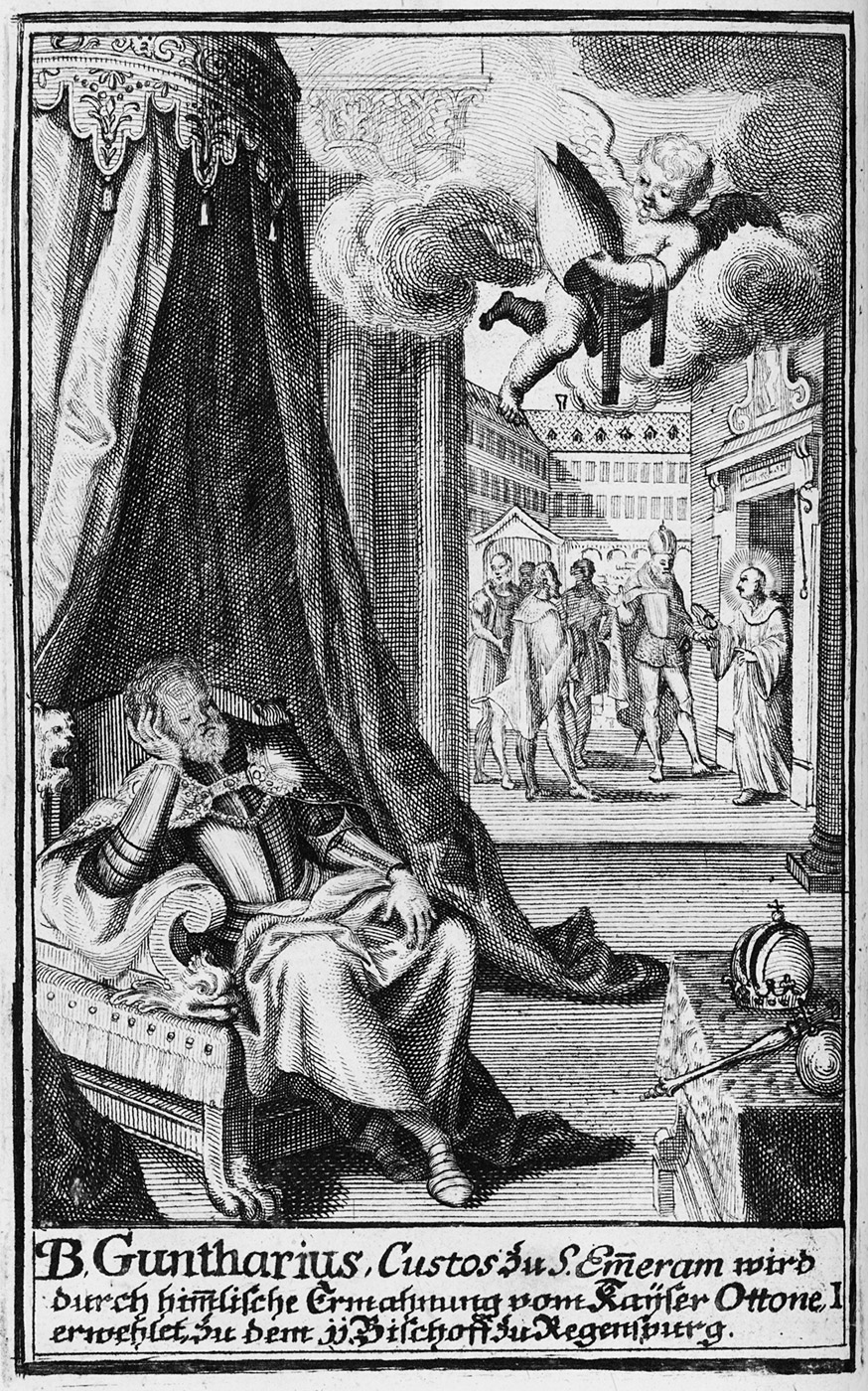 Darstellung der himmlischen Erwählung des Regensburger Bischofs Gunter im Traum Kaiser Ottos I., aus: Anselm Goudin: Sigreiche Unschuld des Grossen Regenspurgerischen Bischoffs, Wunderthätigen Apostels des Bayerlands, unüberwindlichen Blut-Zeugens Christi, und seines uhralten Kayserlichen freyen Reichs-Stiffts Hochheiligen Ertz-Patrons Emmerami, 16,5 x 10,5 cm, Regensburg : Immig, 1726